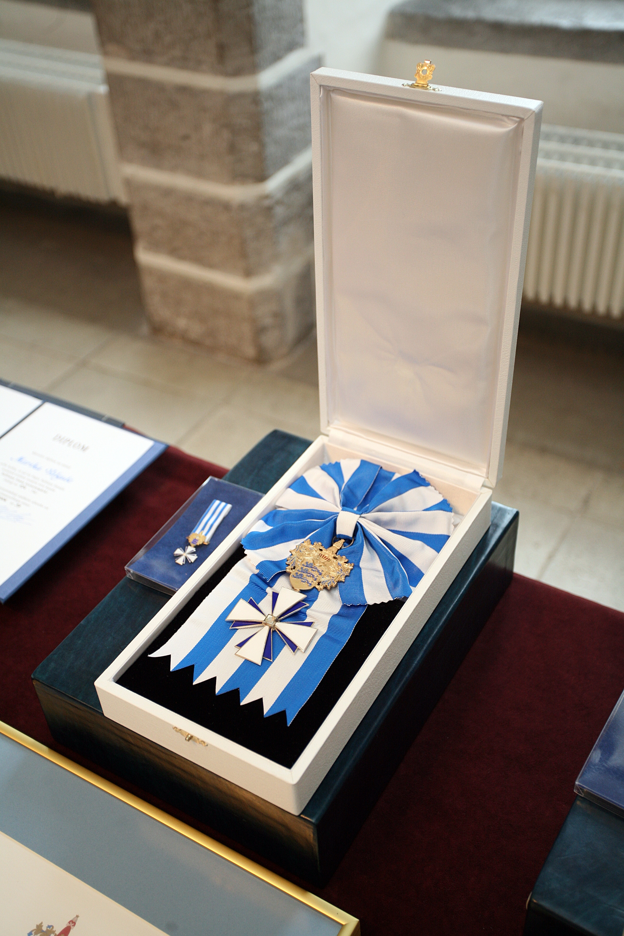 Tallinna vapimärk